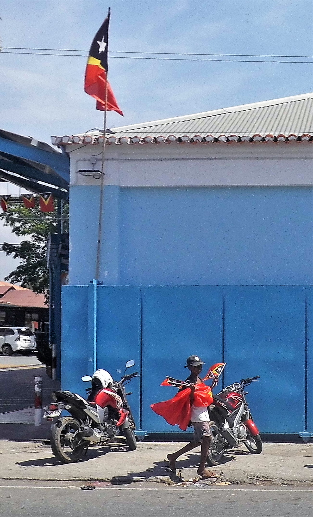 Flaggenhändler